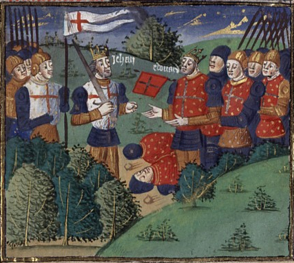 Capture de Jean le Bon à la bataille de Poitiers